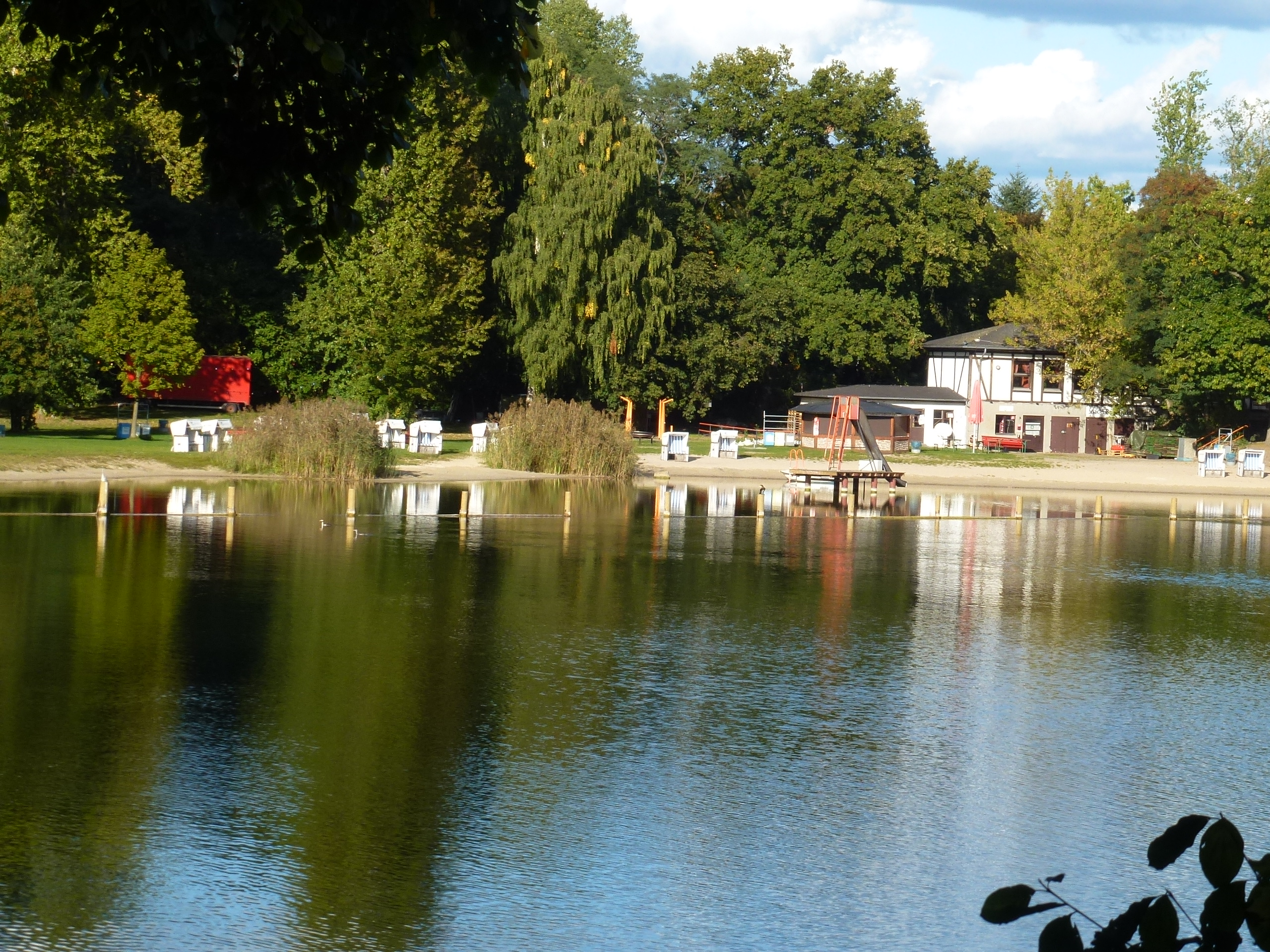 Berlin-Lübars Freibad Lübars am Ziegeleisee